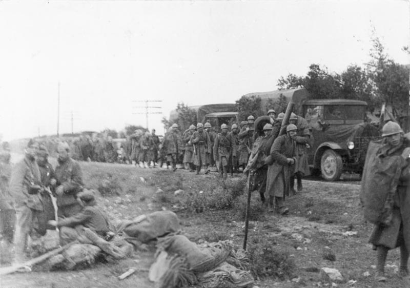 Die grosse Winterschlacht um Guadalajara Anfang März begann die grosse Offensive der nationalen Truppen auf Gudalajara, deren Hauptstoss auf der Strasse Madrid - Saragossa (Carretera de Aragon) geführt wurde. Die ausserordentlich schweren Kämpfe nahmen einen wechselnden Verlauf; das Kriegsglück, das sich im Anfang den Nationalen zuneigte, wandte sich später den Roten zu. Kälte, Hagelsturm, aufgeweichter Boden und scharfe Winde erwiesen sich oft als schlimmere Gegner als das feindliche Feuer. Die Soldaten der ersten beiden freiwilligen Divisionen lagen fünf Tage lang in Schlamm und Dreck, ohne warmes Essen. Zum ersten Male im spanischen Bürgerkrieg wurden ausschließlich motorisierte Einheiten eingesetzt. Motorisierte Ablösungsmannschaften gehen auf der Strasse Madrid - Saragossa vor. Bei Abdruck nennen: H.G. von Studnitz - Scherl Bilderdienst 29.3.1937